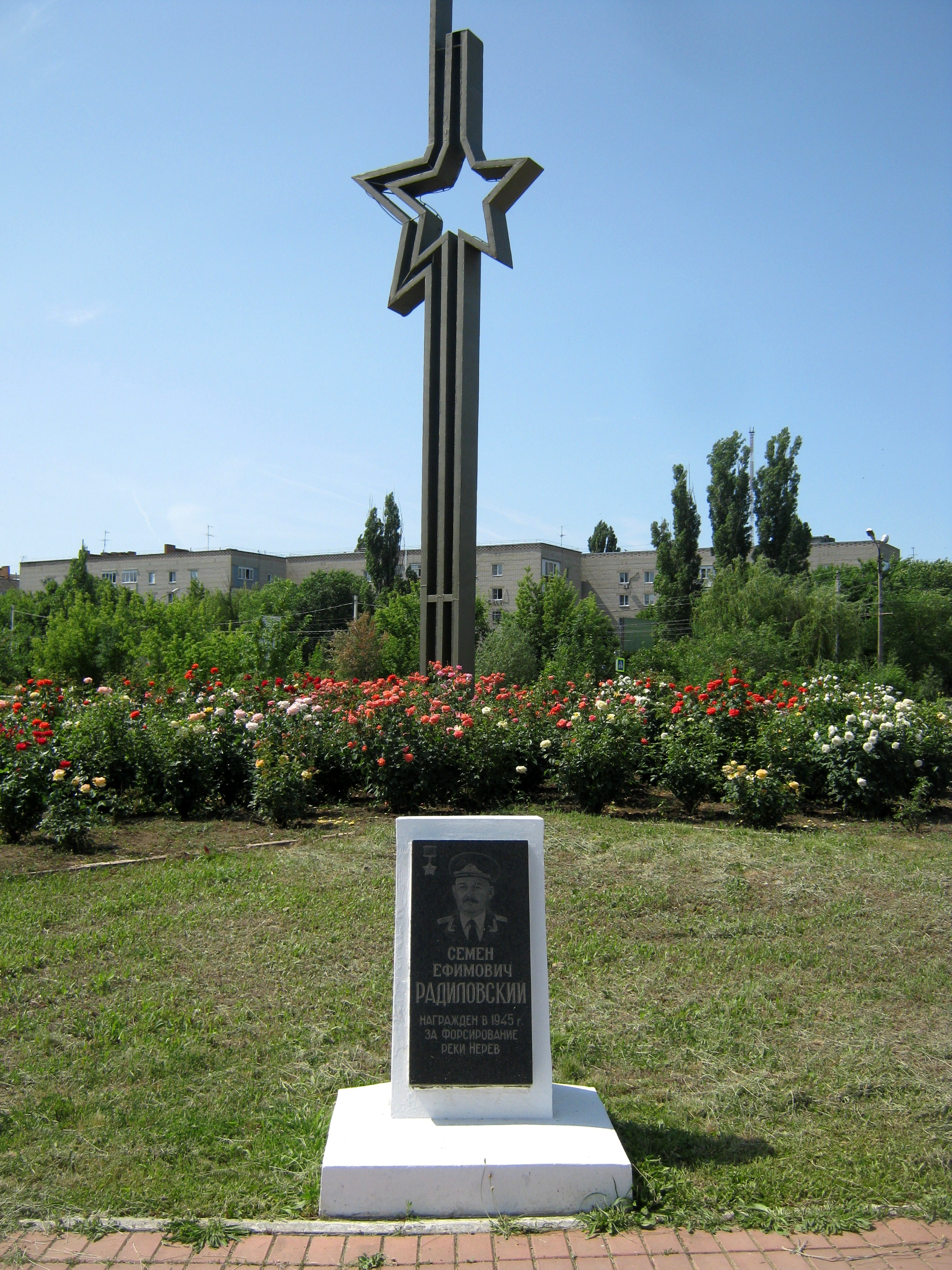 Каменск - Радиловский